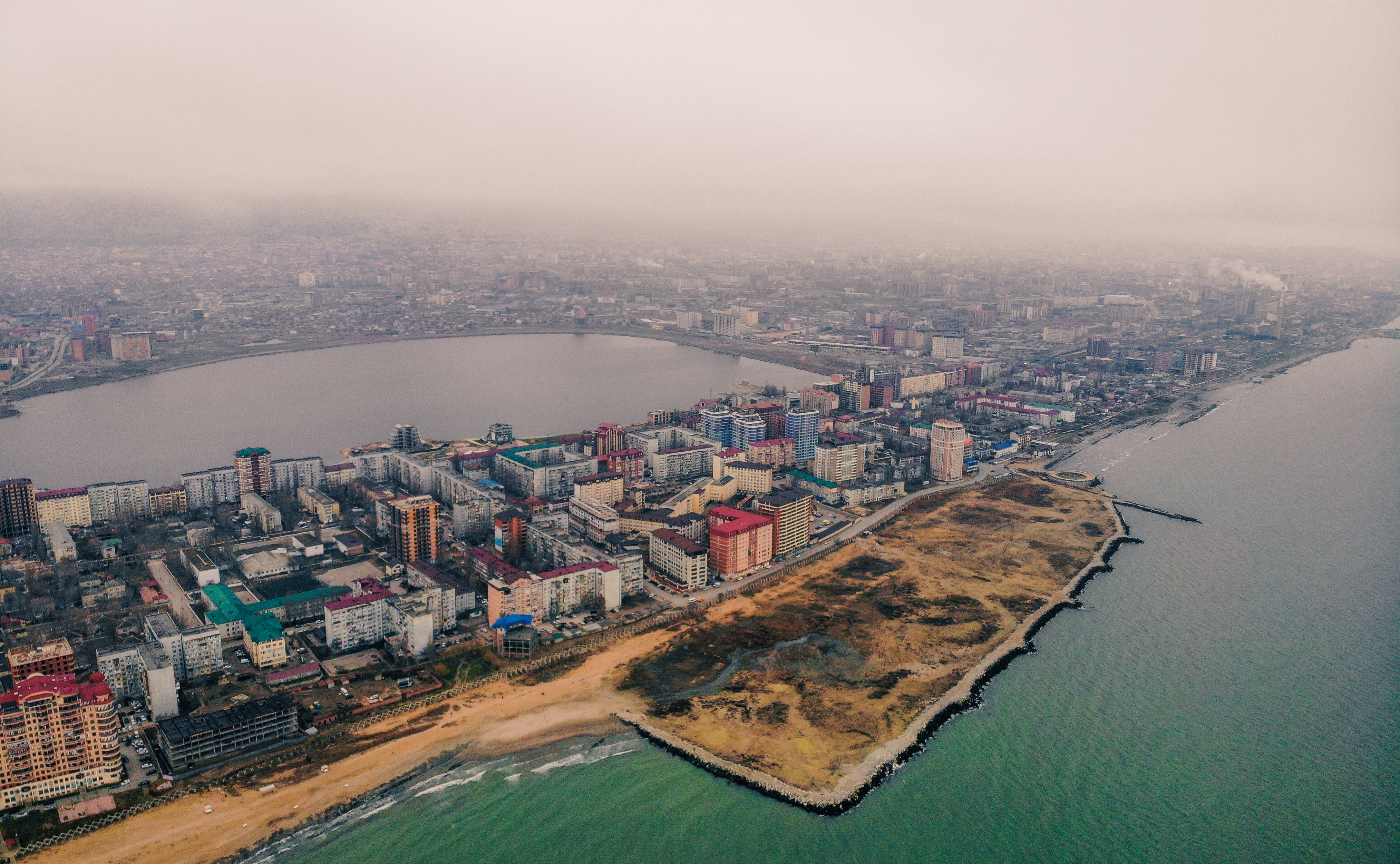 Редукторный посёлок и озеро Ак-Гёль